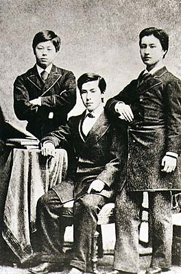 中央：小村寿太郎（宮崎県出身）、右：菊池武夫（岩手県出身）、左：斎藤修一郎（福井県出身）